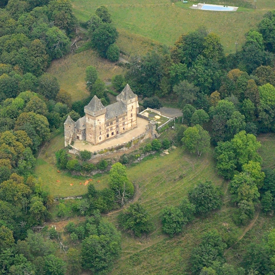 Vue aérienne du château de Messilhac